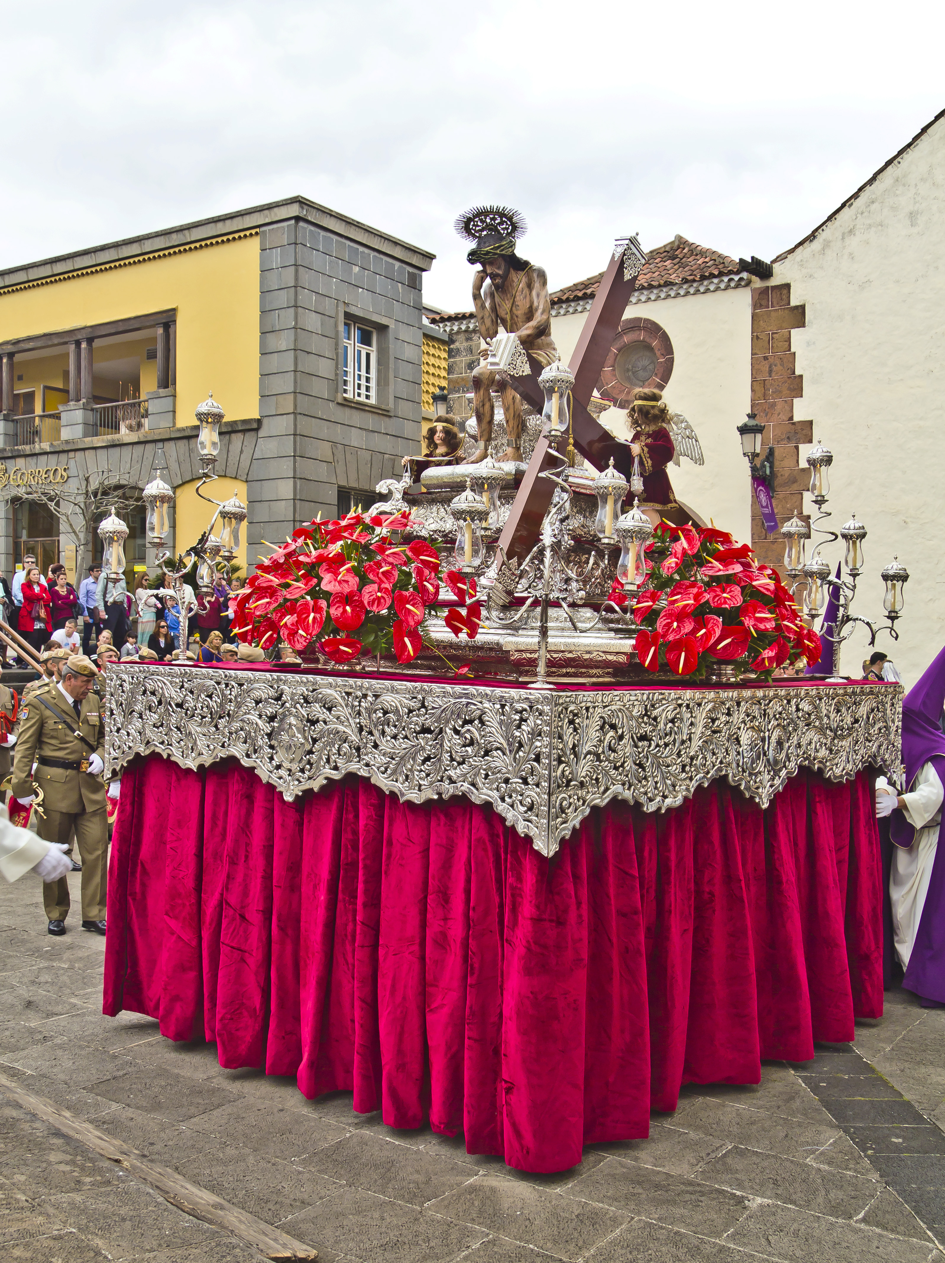 Procesión del Traslado del Santísimo Cristo Difunto desde la Iglesia de Santo Domingo / Paso del Santísimo Cristo de la Humildad y Paciencia